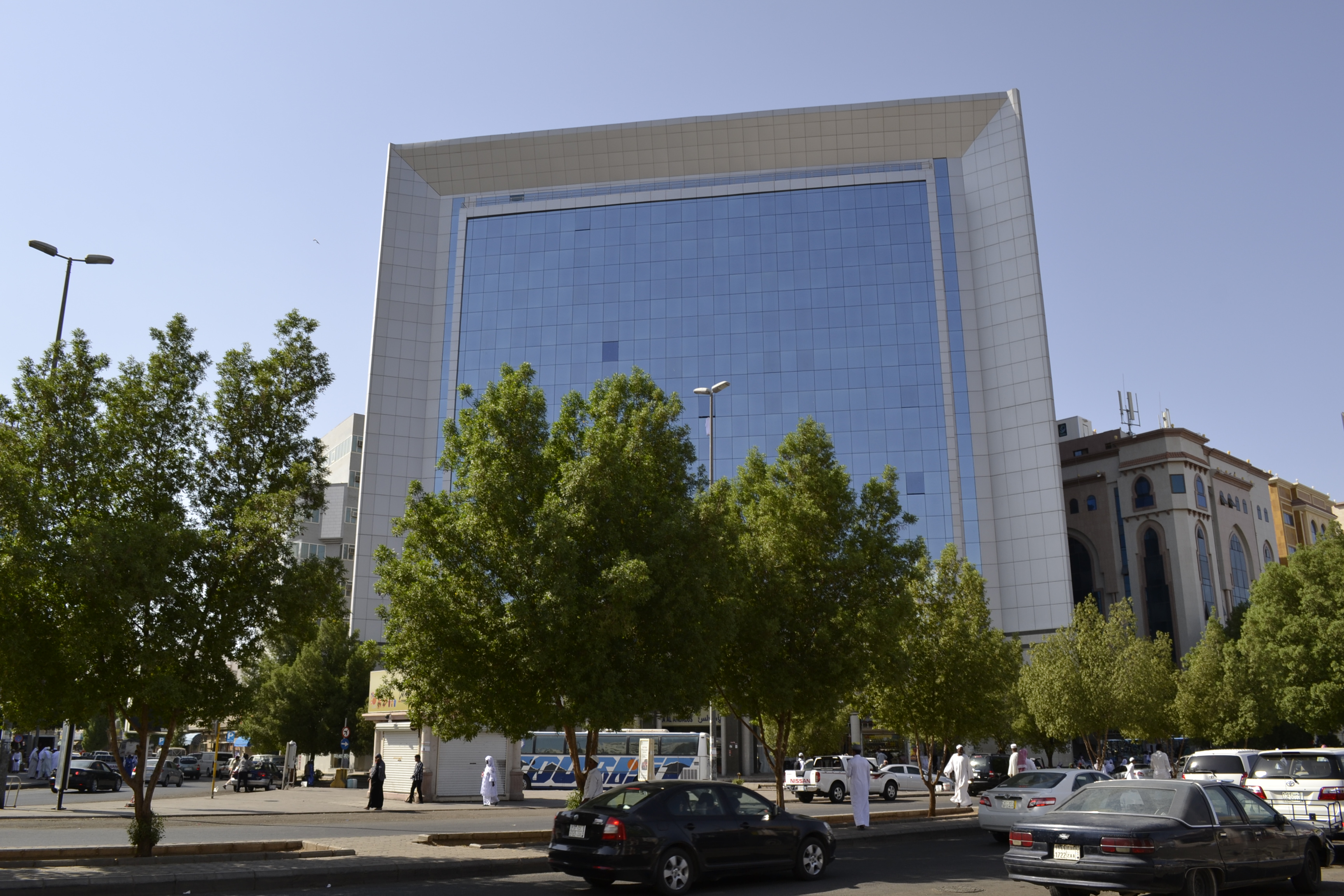 Kantor Bank Arrajhi yang terletak di Jalan Abu Dzar Al-Ghifari